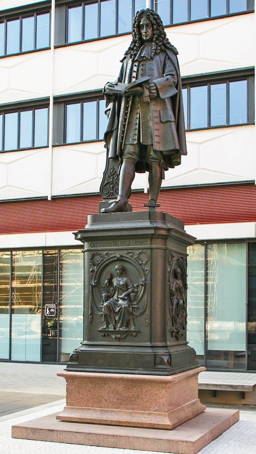 Leibnitz-Denkmal Uni Leipzig